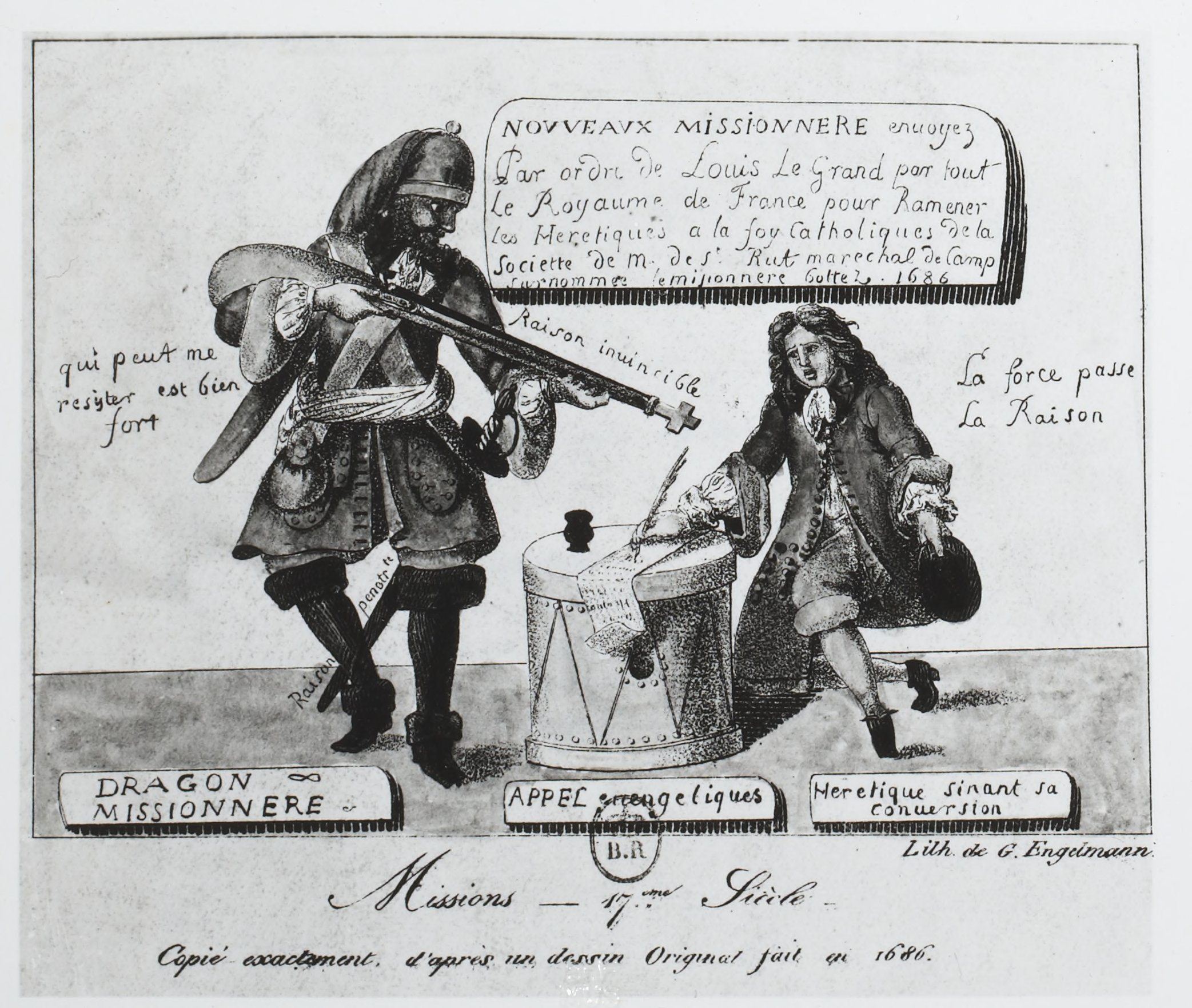 Le dragon missionnaire. Le dragon menace un hérétique (protestant) avec un fusil. « Nouveaux missionnere envoyez par ordre de Louis le Grand par tout le Royaume de France pour ramener les Hérétiques à la foy catholique de la société de M. de St Rut maréchal de camp surnommé le missionnere Gottez. 1686. » Légende : « Dragon Missionnere: qui peut me résister est bien fort. Appel évengélique: Raison invincible. Hérétique sinant la conversion: la force passe la Raison. »